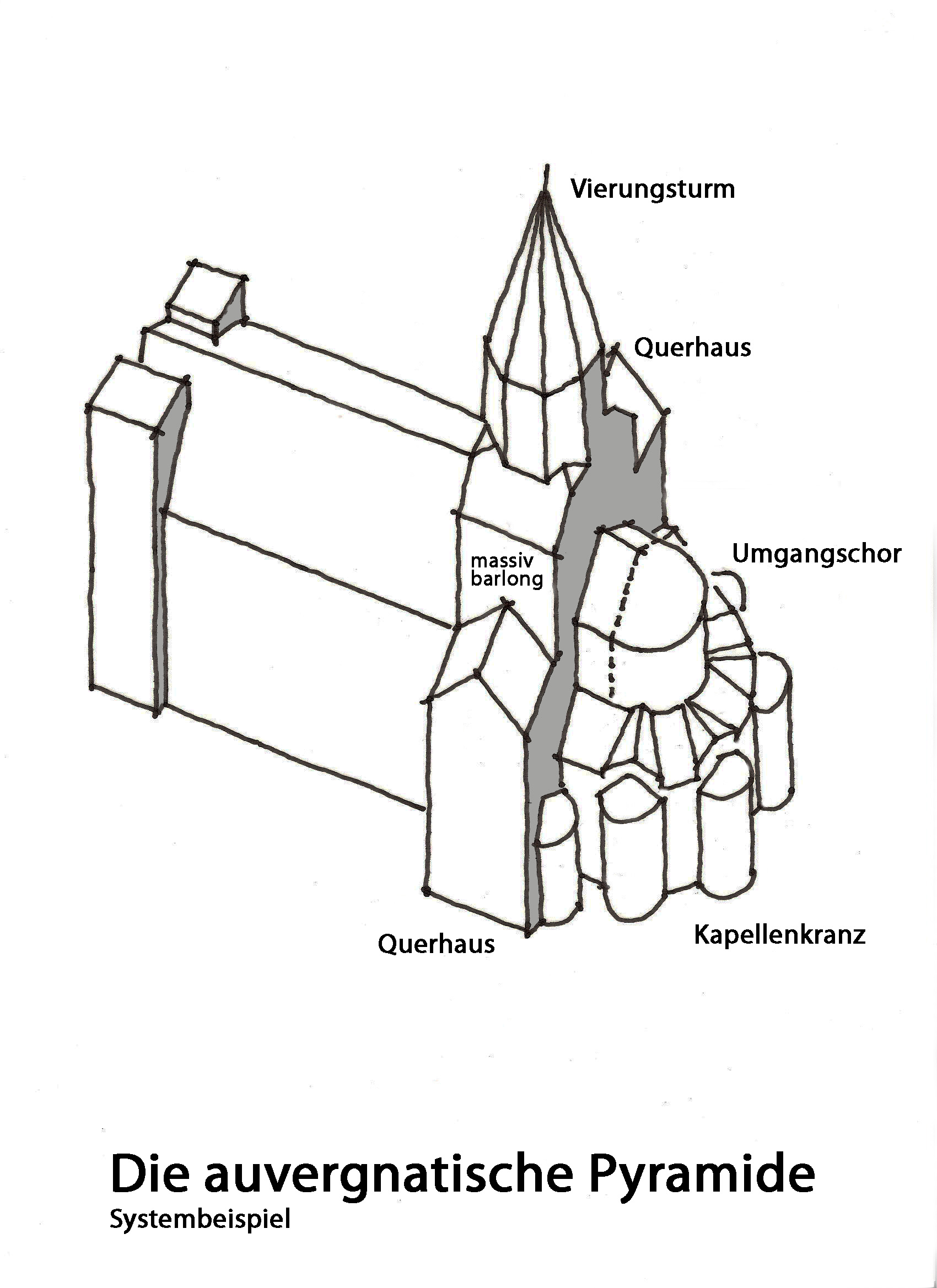 Die auvergnatisch Pyramide, Handskizze